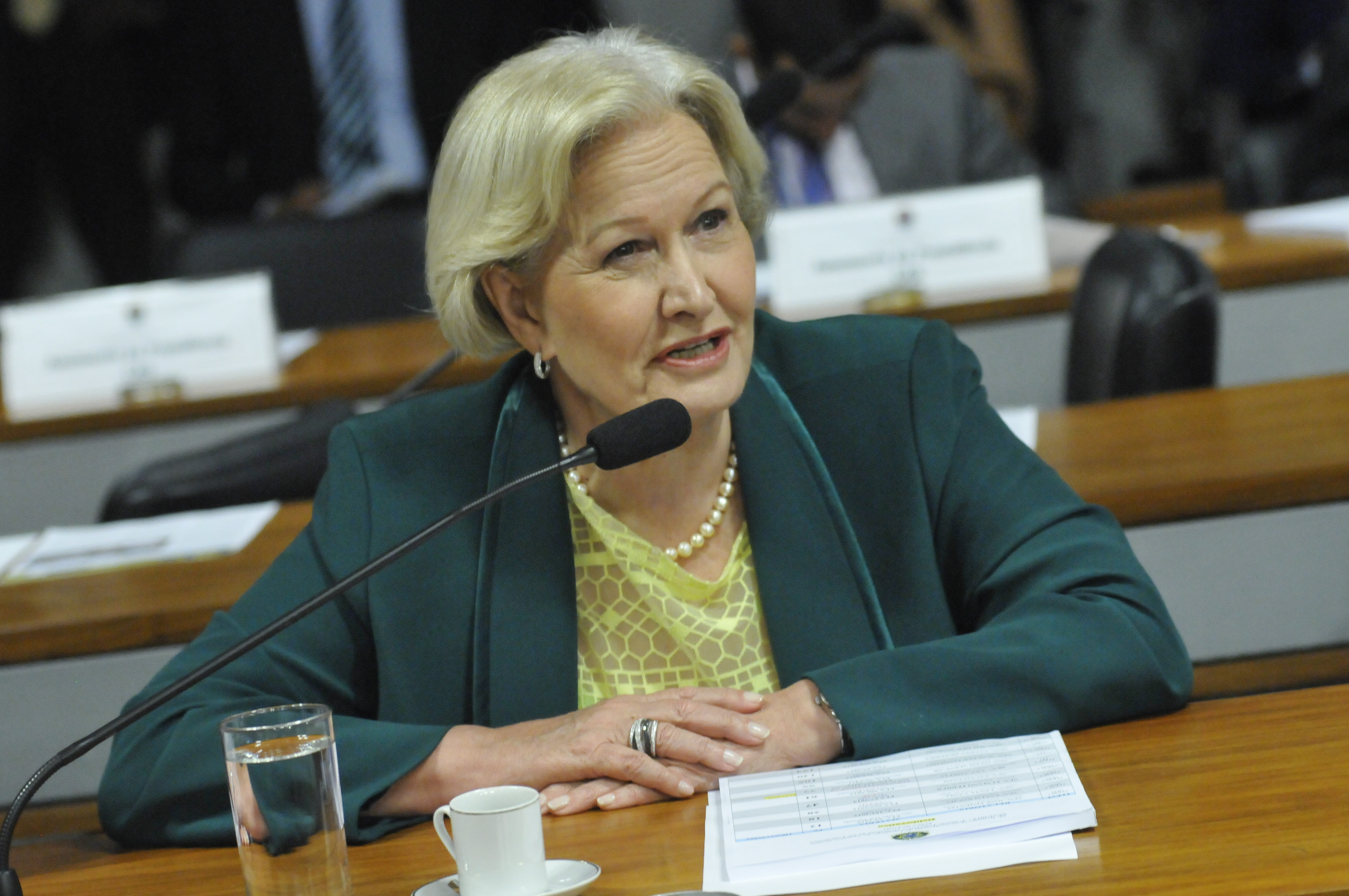 Comissão de Assuntos Sociais (CAS) realiza reunião com 10 itens na pauta. Entre eles, PLC 84/2015, que proíbe anúncio de emprego em classificados sem identificação do contratante; e PLS 67/2013, que trata da logística reversa de veículos automotores. À bancada, senadora Ana Amélia (PP-RS). Foto: Geraldo Magela/Agência Senado